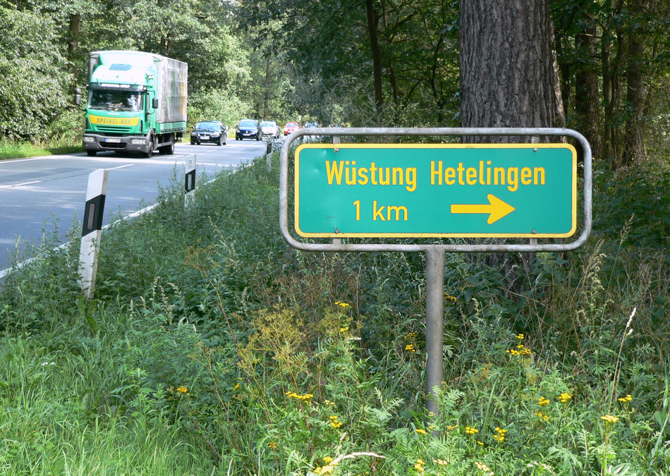 Hetelingen Schild